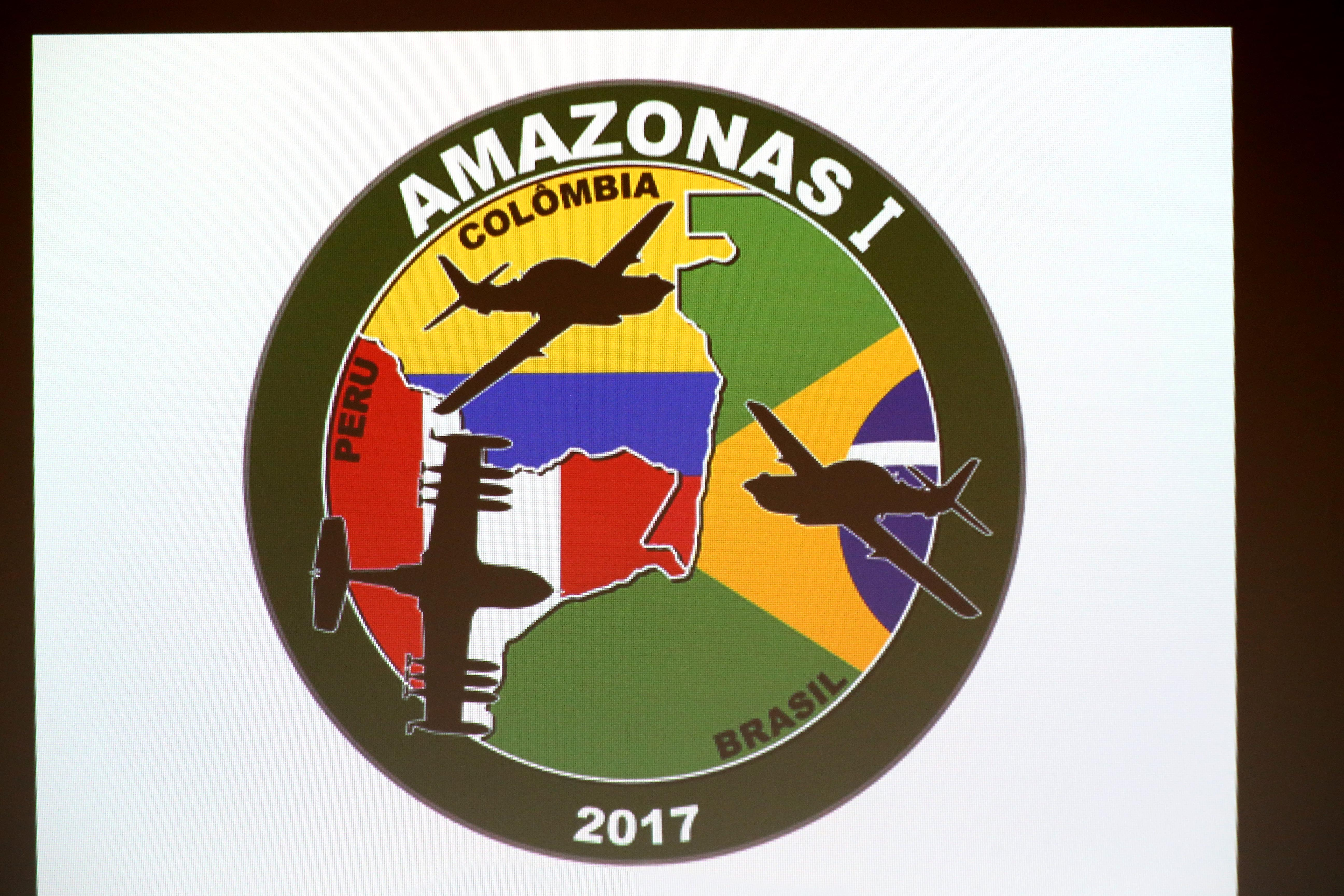 PERÚ, BRASIL Y COLOMBIA REALIZAN PRIMER EJERCICIO AÉREO CONJUNTO DE INTERDICCIÓN EN LA AMAZONÍA